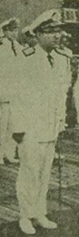 VicealmiranteEnrique Grünwaldt